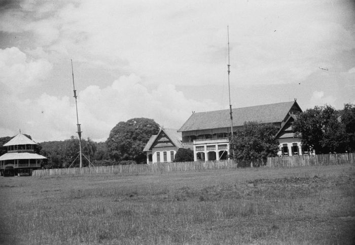 negatief. Het paleis van de sultan van Bima